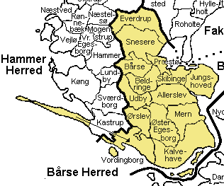 Bårse Herred Præstø Amt , Denmark.